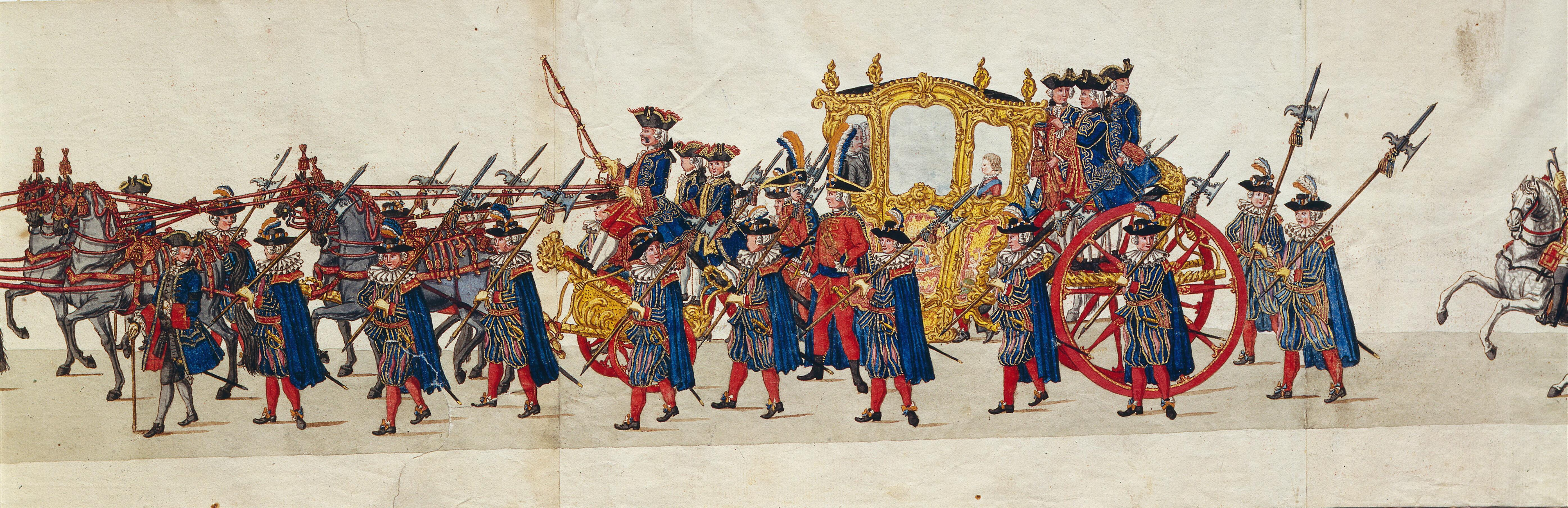 In 1752 bracht de toen vierjarige Prins Willem (V) een tegenbezoek aan de pas benoemde Franse ambassadeur. De schilder Tethart Haag legde de stoet vast op een zes meter lange rol papier, waarvan hier het middendeel te zien is. Stichting Historische Verzamelingen, schilderij van Tethart Haag